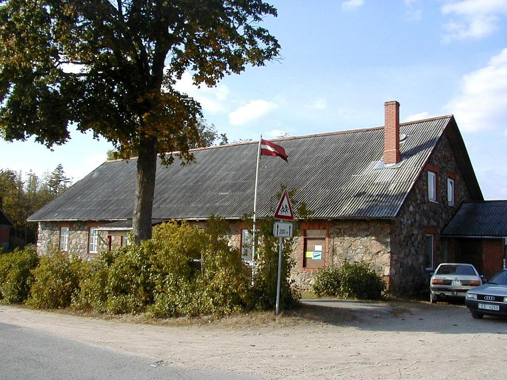 Mārkalnes pagastnams 2002-09-13